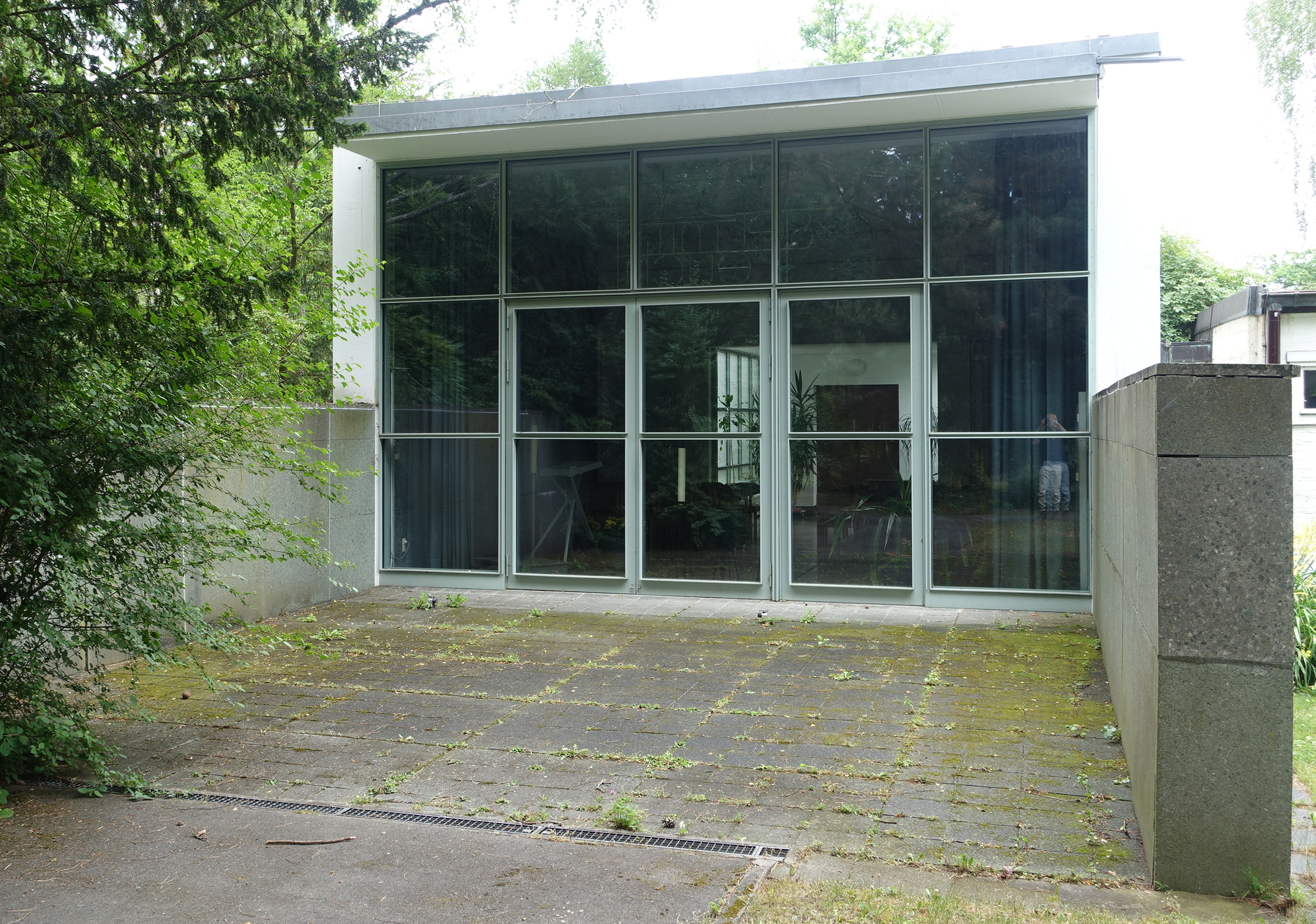 Feierhalle